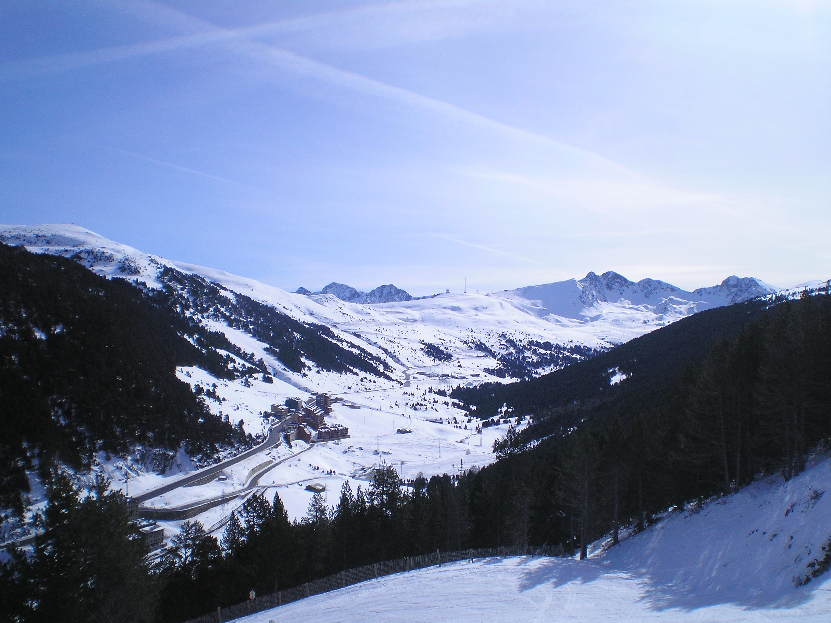 Port d'Envalira, en Andorre, entre Soldeu et Pas de la Case.